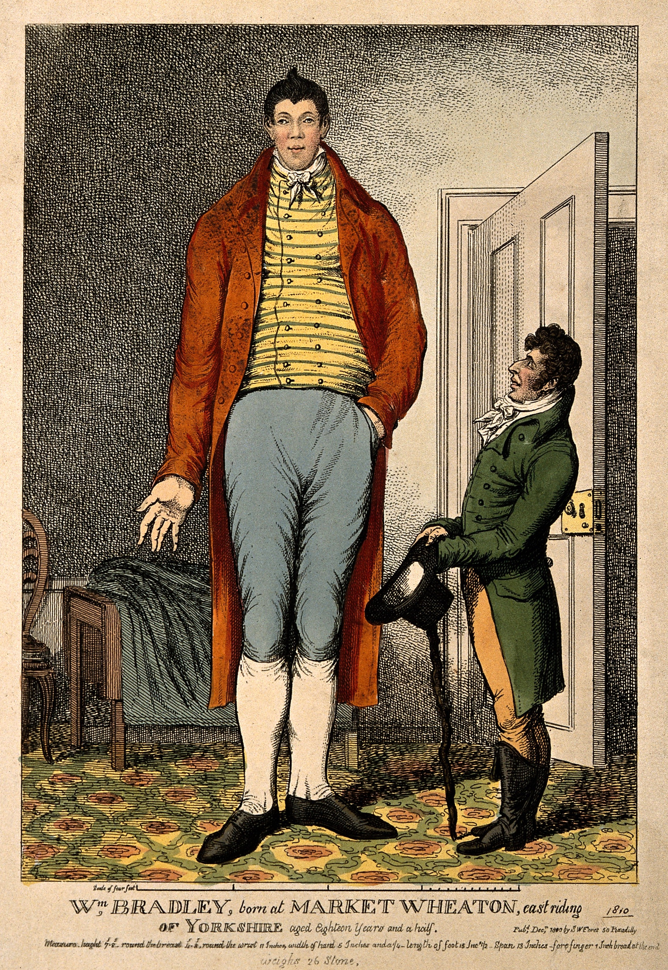 William Bradley (giant)